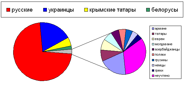 Национальный состав населения Феодосии